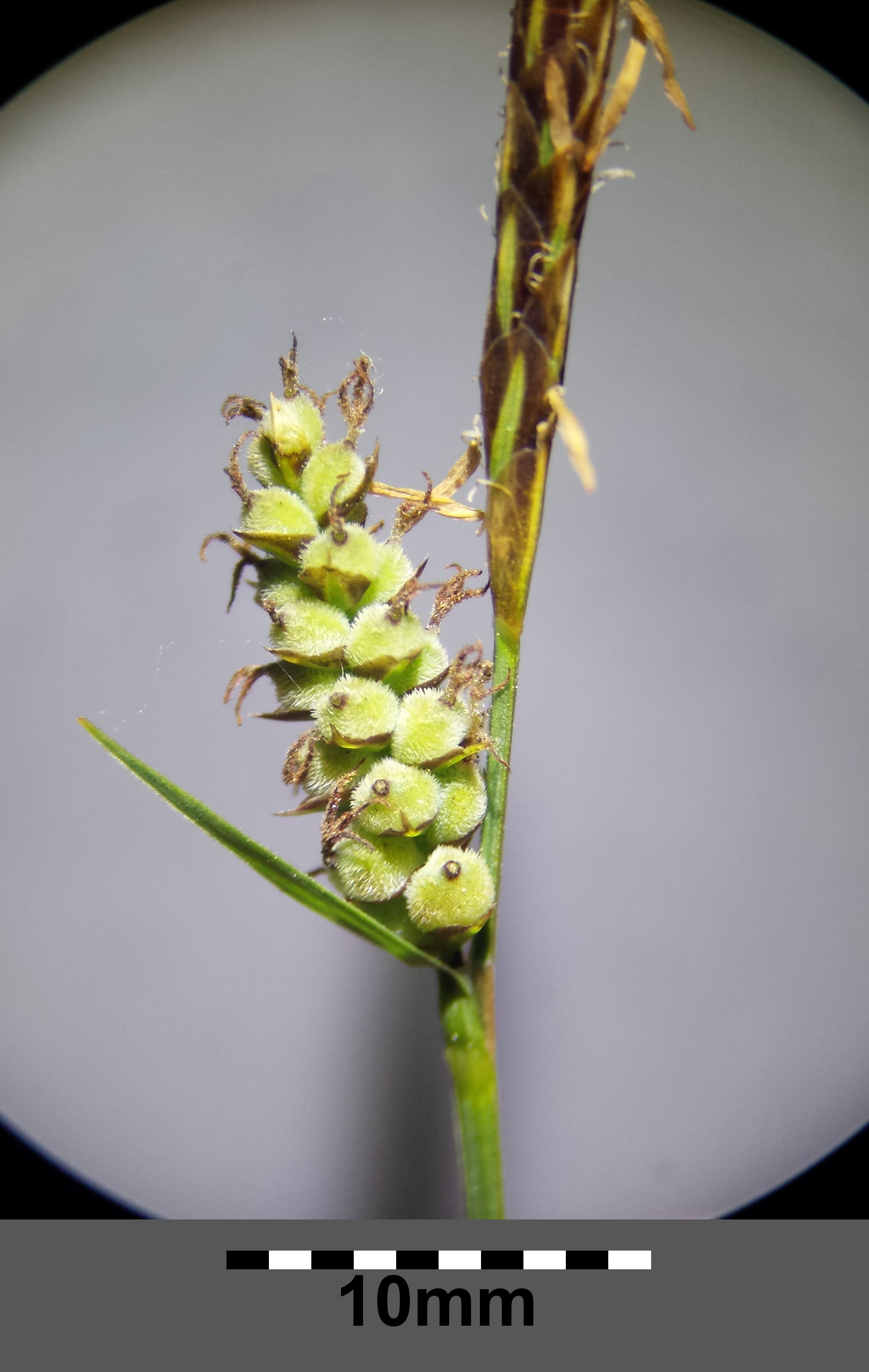 Blütenstand mit oben einer ♂ und unten einer ♀ Ähre Taxonym: Carex tomentosa ss Fischer et al. EfÖLS 2008 ISBN 978-3-85474-187-9 Fundort: nächst der Martenhofen-Lacken im Seewinkel, Bezirk Neusiedl am See, Burgenland, Österreich - ca. 120 m ü. A. Standort: salzhältige Wiese